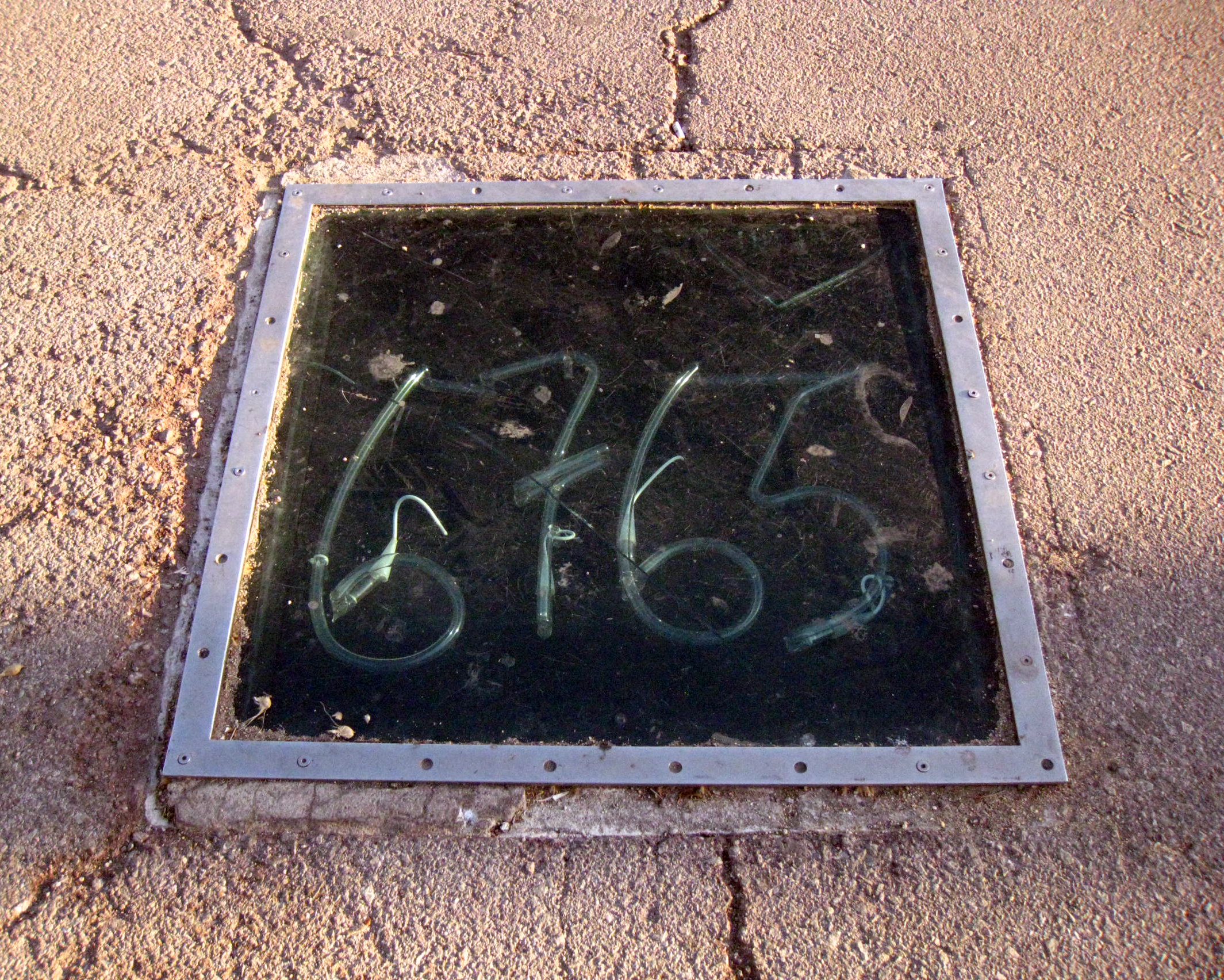 Configuracions Urbanes: Crescendo appare (Mario Merz). Moll de la Barceloneta (Barcelona)